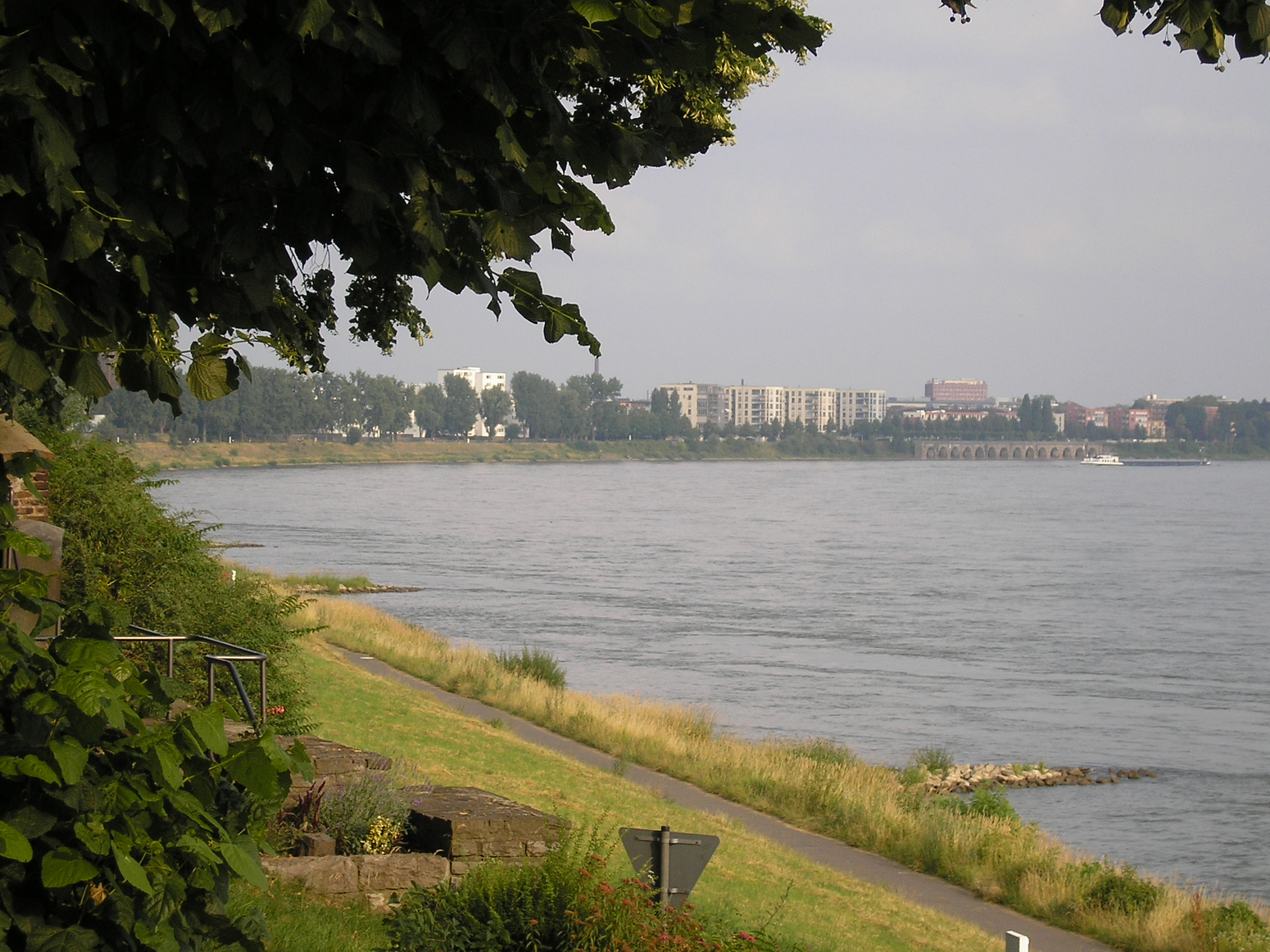 Schlosspark Stammheim, Blick über den Rhein auf Köln-Mülheim.